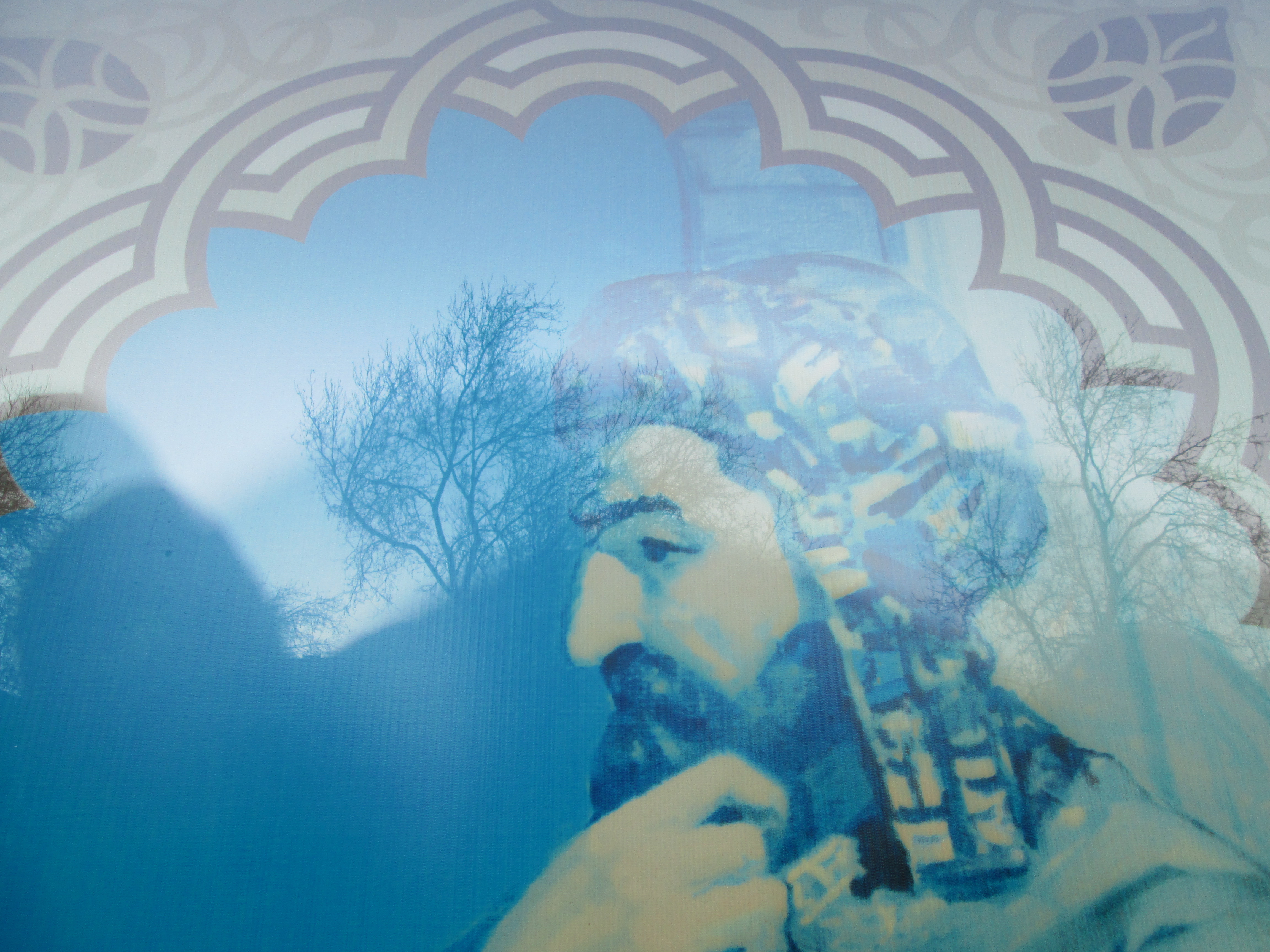 Nizami adına Ədəbiyyat Muzeyinin binasının pəncərəsində İzzəddin Həsənoğlu rəsmi